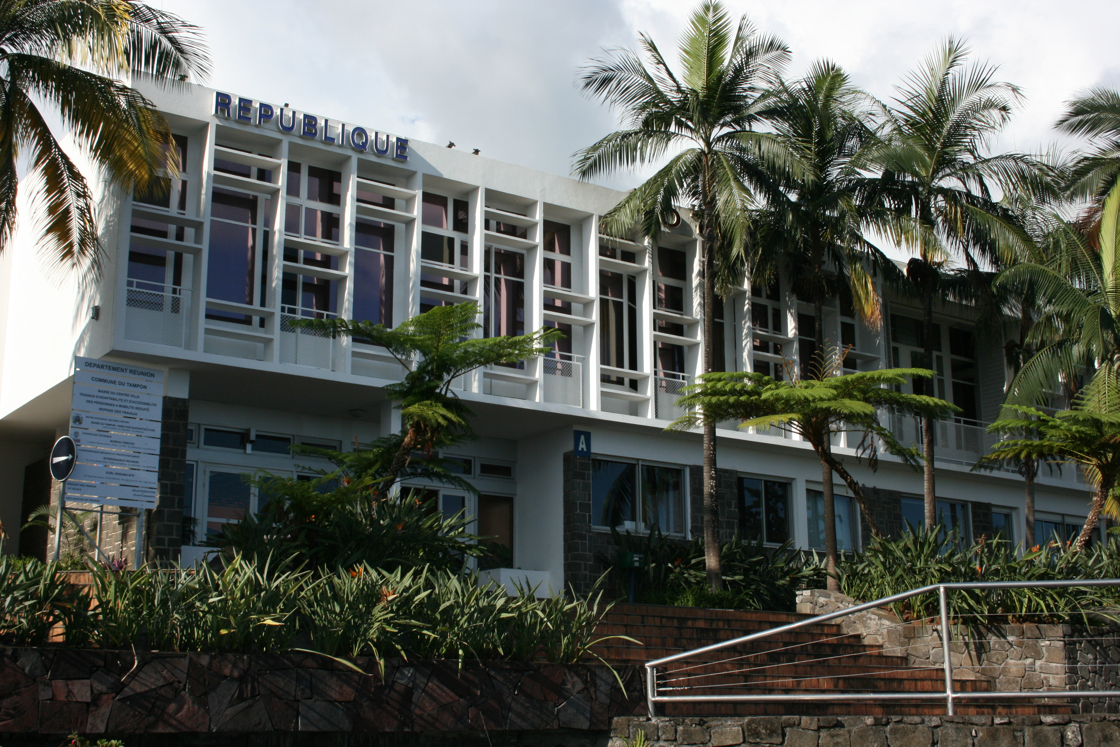 Vue de l'hôtel de ville du Tampon, à La Réunion.